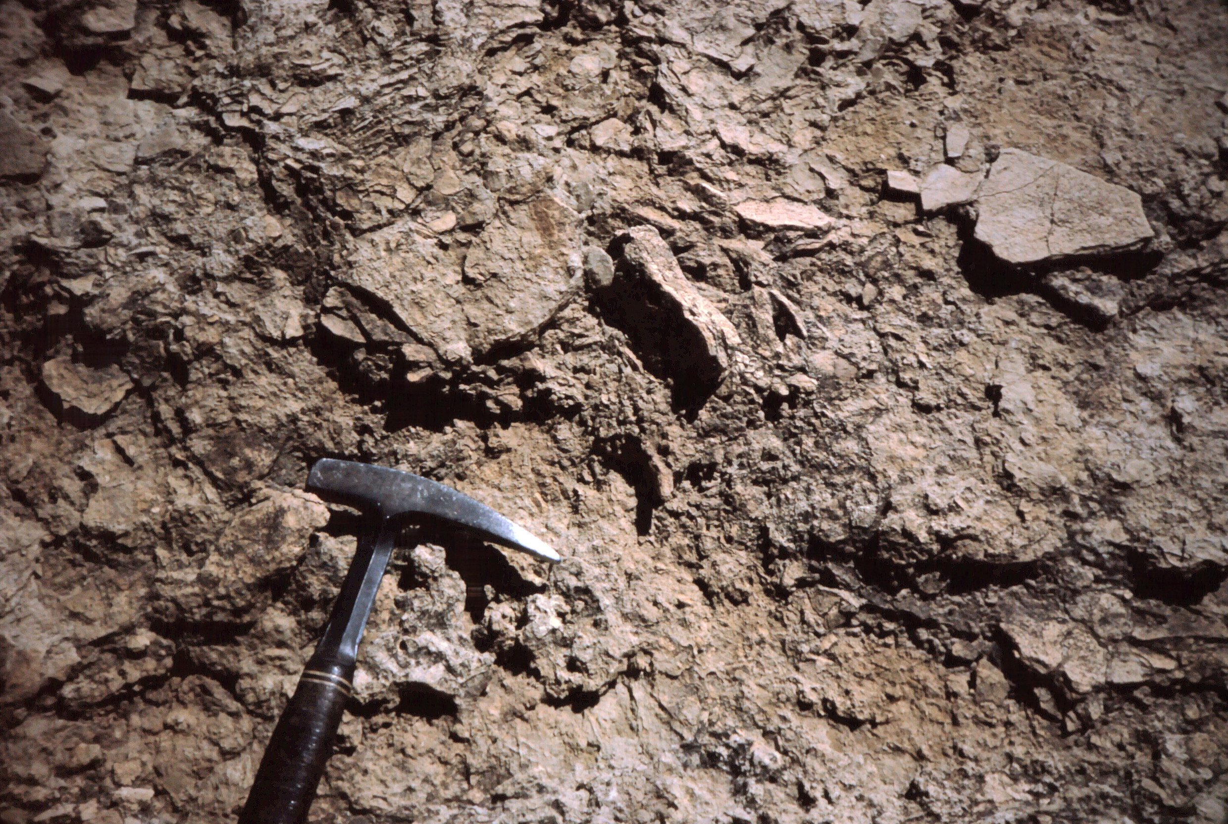 Brèche de tempête au sommet d'une séquence régressive métrique. Les plaquettes dolomitiques stromatolitiques sont disloquées puis déplacées à la surface du rivage par les vagues et les courants débordant des chenaux sur la zone supratidale. Haut Atlas, Maroc. Voir Septfontaine (1985): Milieux de dépôts et foraminifères (lituolidés) de la plate-forme carbonatée du Lias oyen au Maroc.- Rev. de Micropal. 28/4, 265-289, ou Ænglisc: Tempestite breccia on the surface of a regressive metric sequence; the dolomitic and stromatolitic elements are dislocated and reworked by hurricane waves and currents on the supratidal zone temporarily drowned. High Atlas, Morroco.